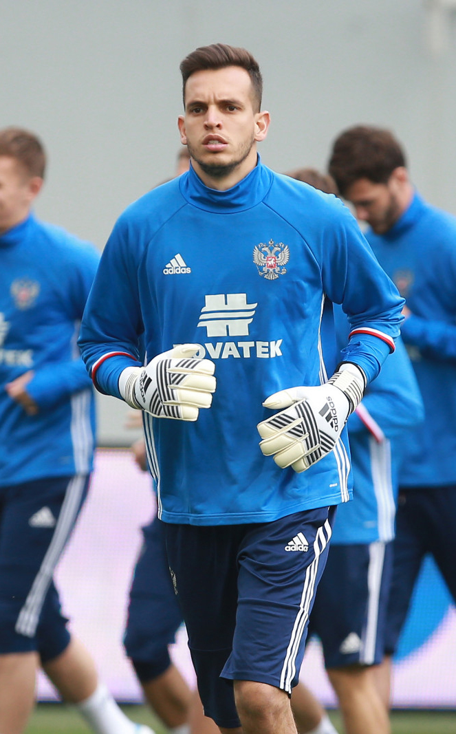 Тренировка сборной России